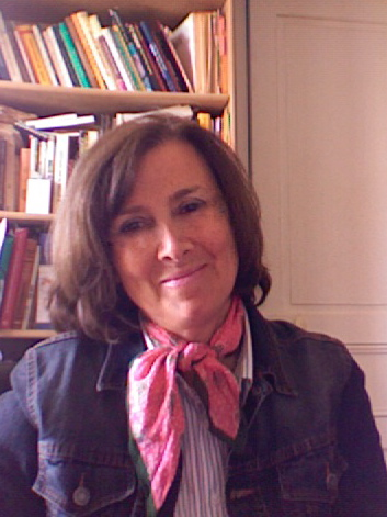 Laetitia Bataille, journaliste équestre et auteur de quatorze ouvrages sur le cheval.